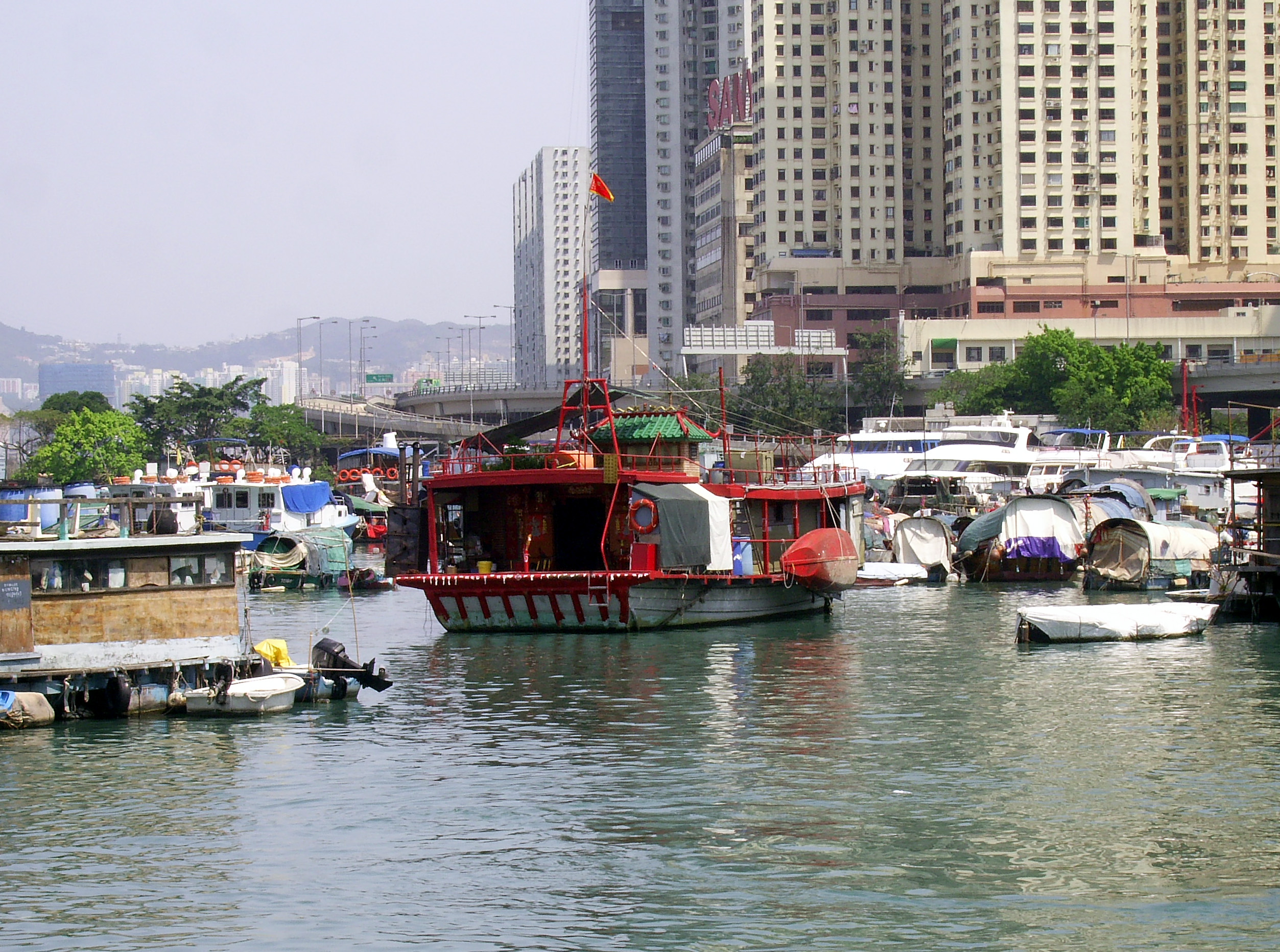 中文（香港）: 水上三角天后廟